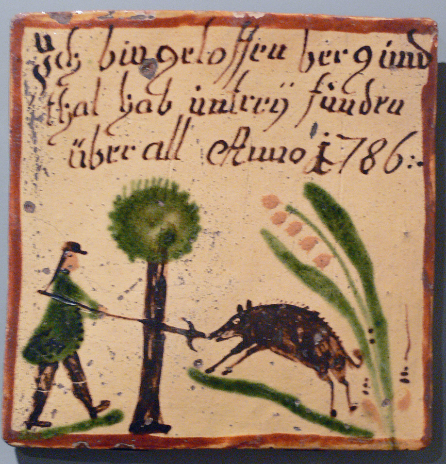 Ofenwandplättchen, Württemberg 1786 Landesmuseum Württemberg (Außenstelle Museum für Volkskultur in Württemberg, Waldenbuch) Ich bin geloffen berg und thal hab untreÿ funden überall Anno 1786